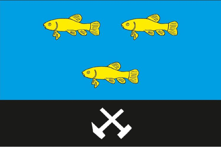 Líně vlajka